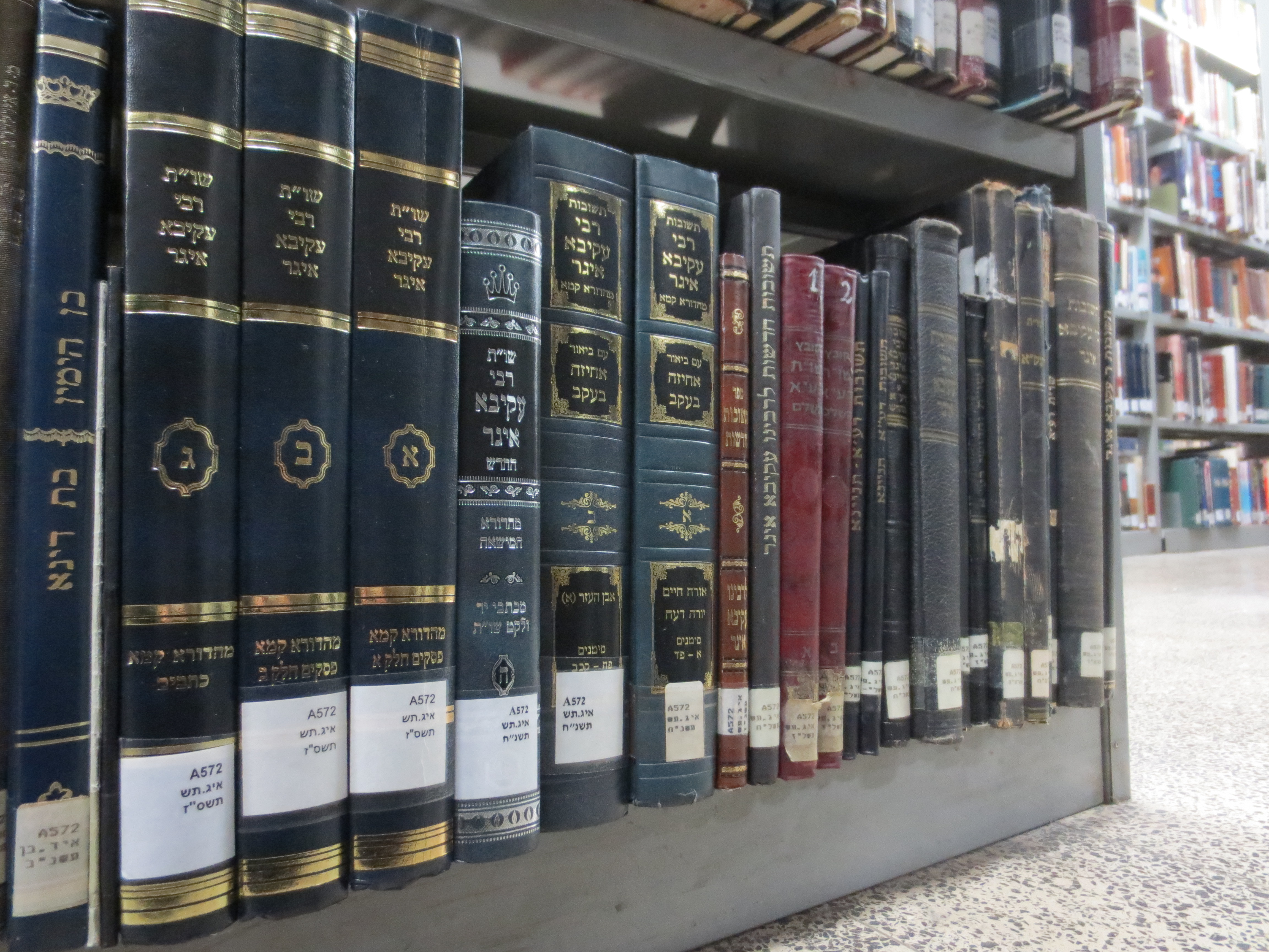 מהדורות שונות של שאלות-ותשובות רבי עקיבא איגר, בספריה המרכזית באוניברסיטת בר-אילן